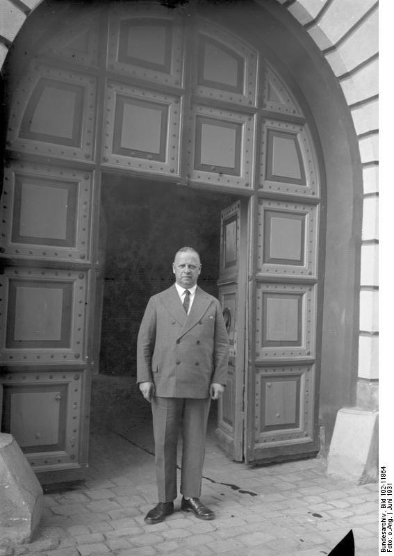 Das schwerste Zuchthaus Deutschlands, Zuchthaus Sonnenburg, die Strafanstalt für Schwerverbrecher. Zum ersten Mal hat der Präsident des Strafvollzugs-Amts gestattet, die schwerste Strafanstalt Deutschlands, aus Zuchthaus Sonnenburg bei Küstrin zu photographieren. Ca. 400 Insassen verbüssesn dort eine Strafe von insgesamt ungefähr 2500 Jahre. Die Behandlung der Schwerverbrecher wird nach den modernsten Grundsätzen der Zuchthausordnung ausgeführt. Die Gefangenen unterhalten eine eigene Druckerei, Tischlerei, Bäckerei usw. Nach Verbüssung einer gewissen Zeit werden die Strafgefangenen bei guter Führung auch mit Aussenarbeit beschäftigt. Der Leiter des Zuchthauses Sonnenburg, Dir. Normann.